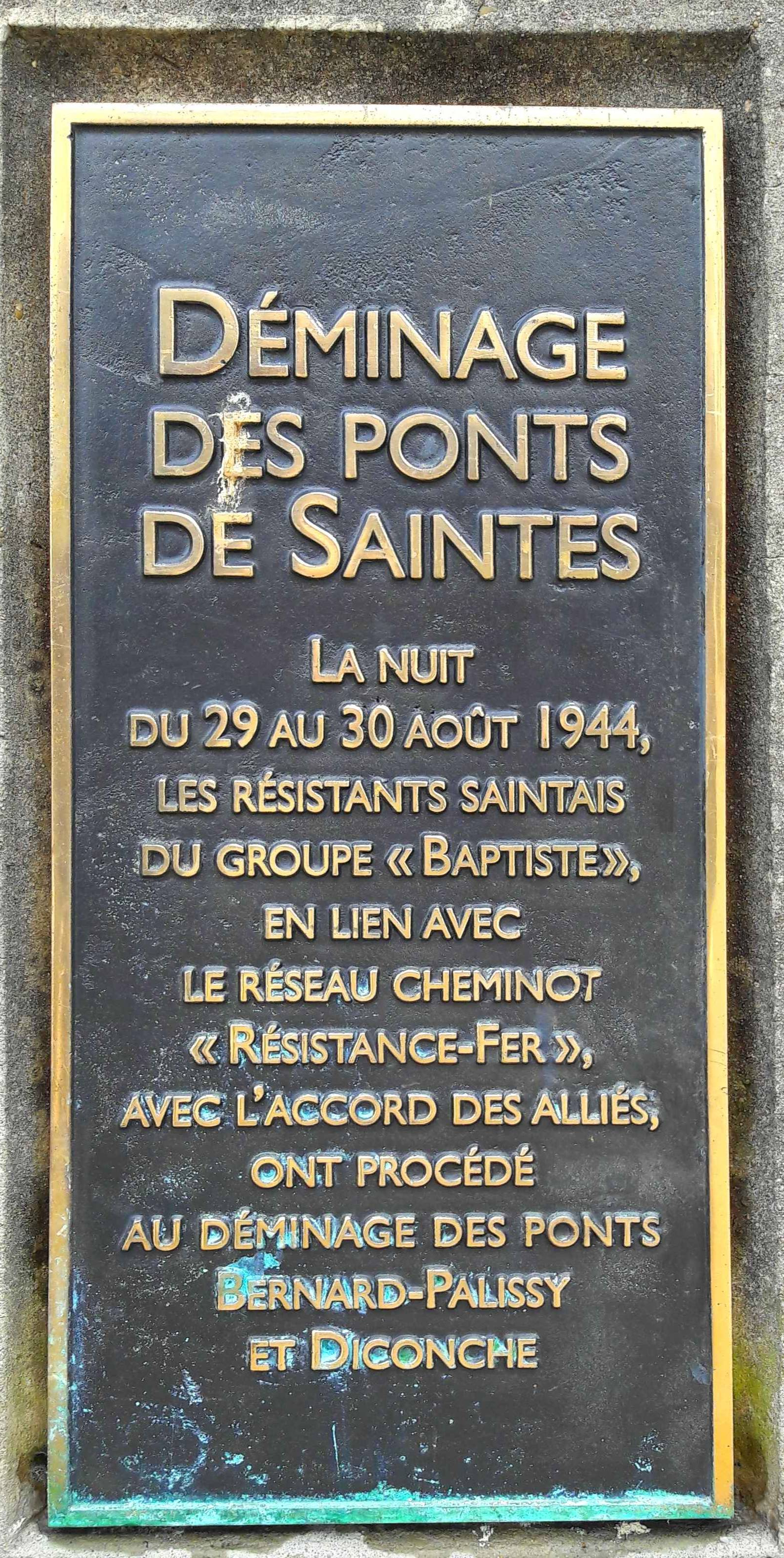 Plaque apposée sur le pont Bernard-Palissy à Saintes, commémorant le déminage de ce pont et du pont ferroviaire de Diconche par la Résistance dans la nuit du 29 au 30 août 1944.